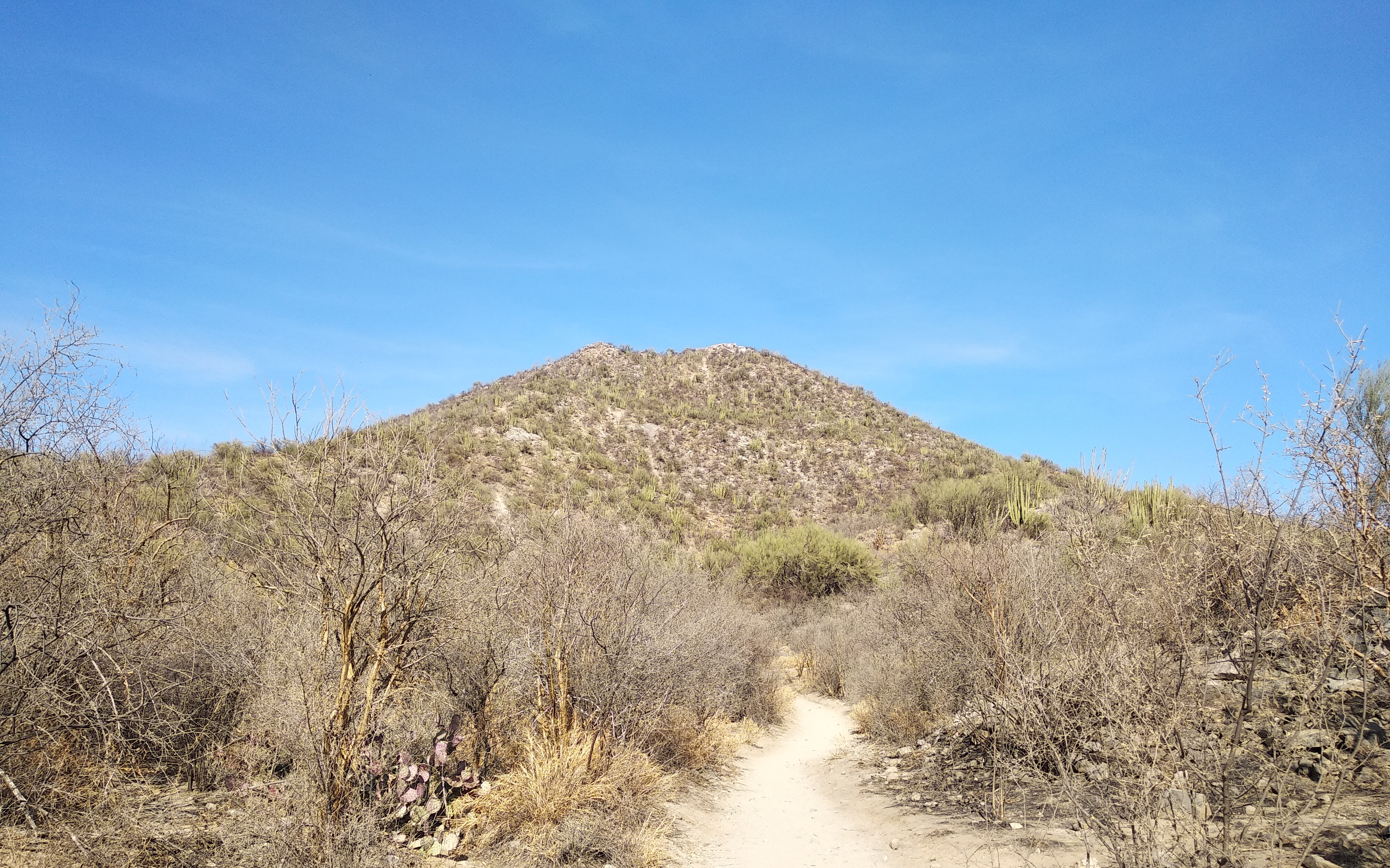 Ruta usual de ascenso para el cerro del Bachoco, en Hermosillo, Sonora, México.